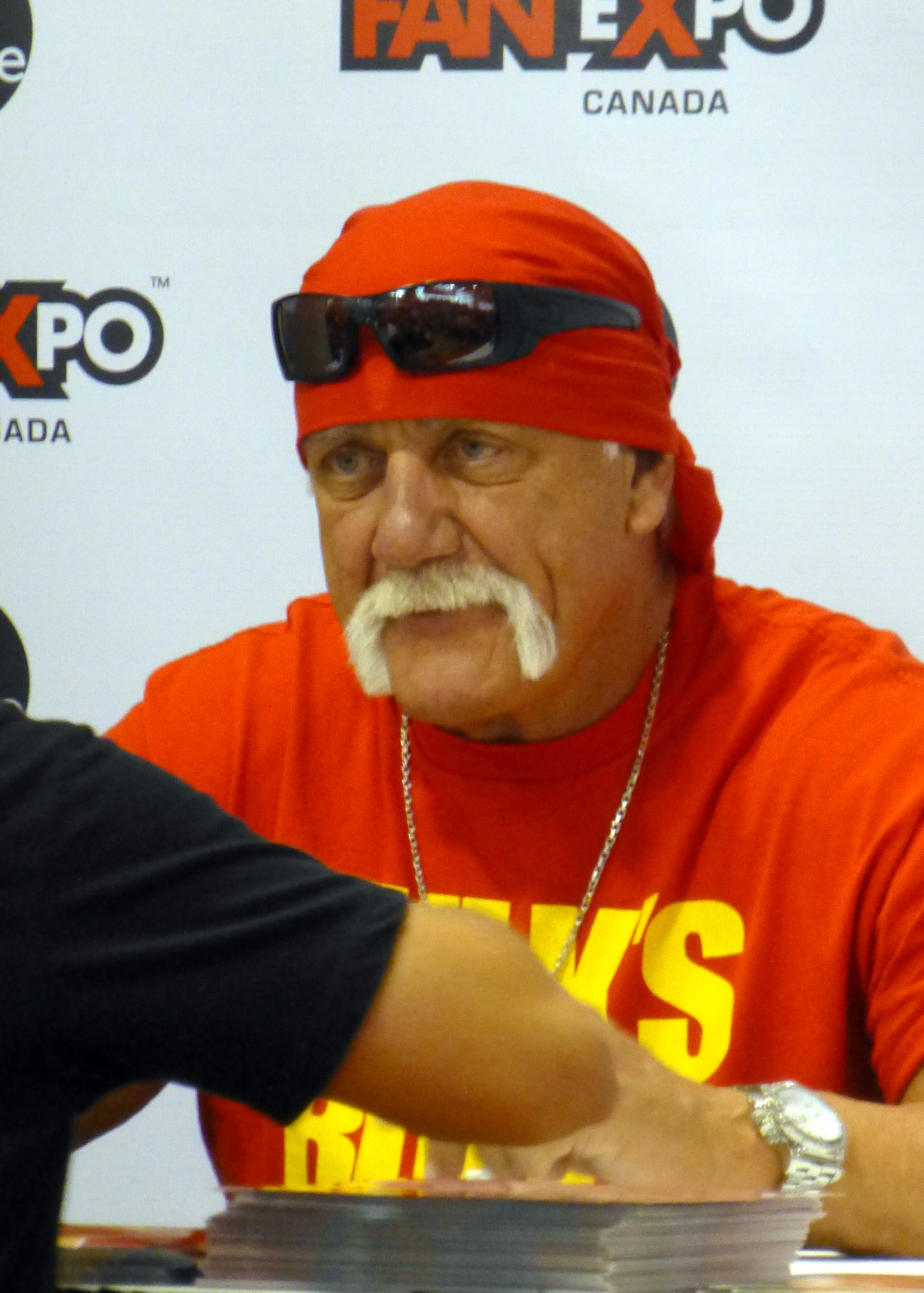 Hulk Hogan 01 2014 Fan Expo Canada